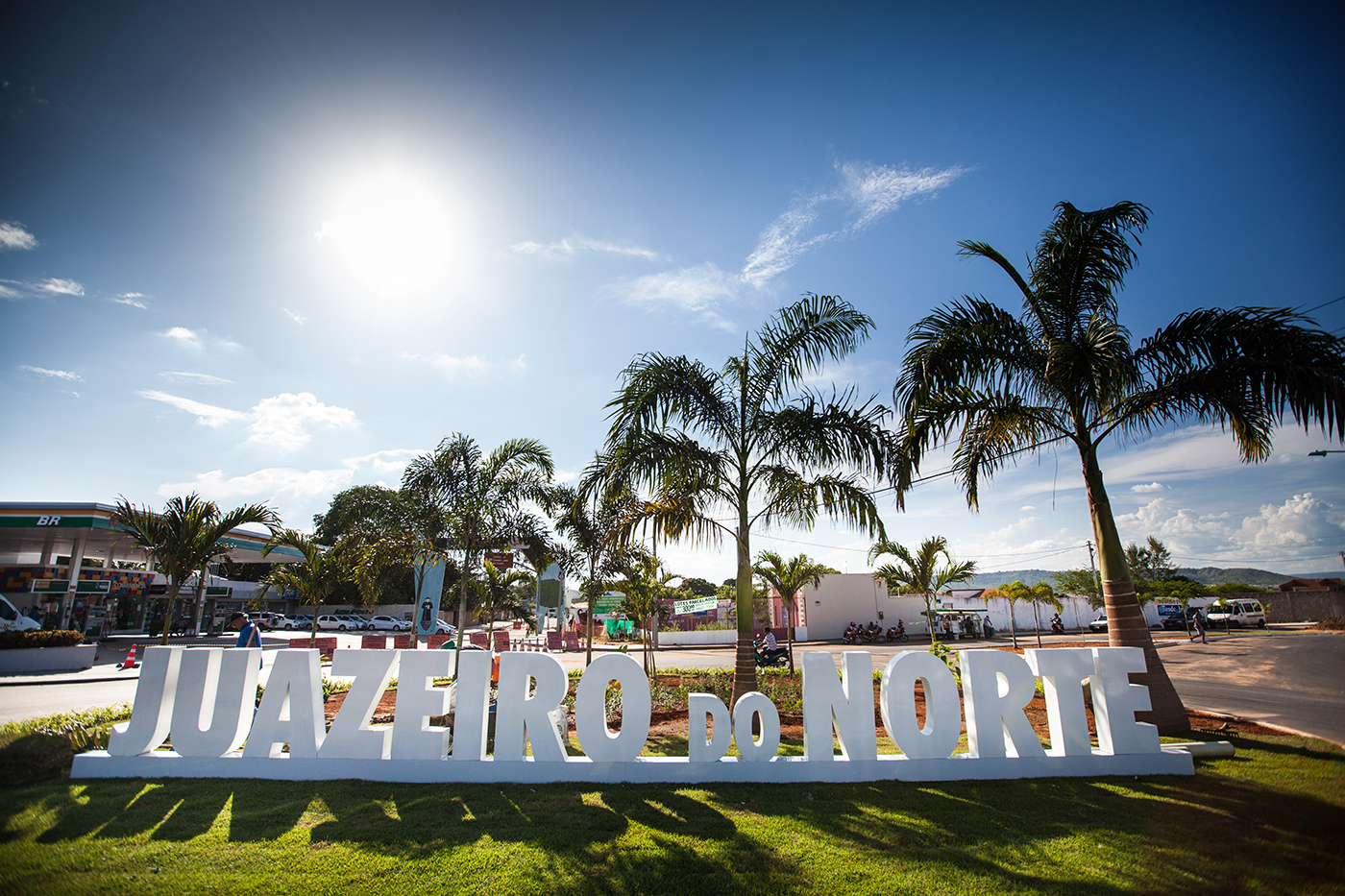 Imagem do Letreiro de Juazeiro do Norte, Ceará, Brasil